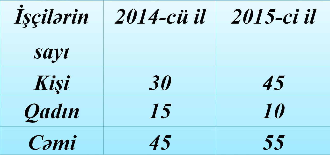 Koordinasiya nisbi kəmiyyəti